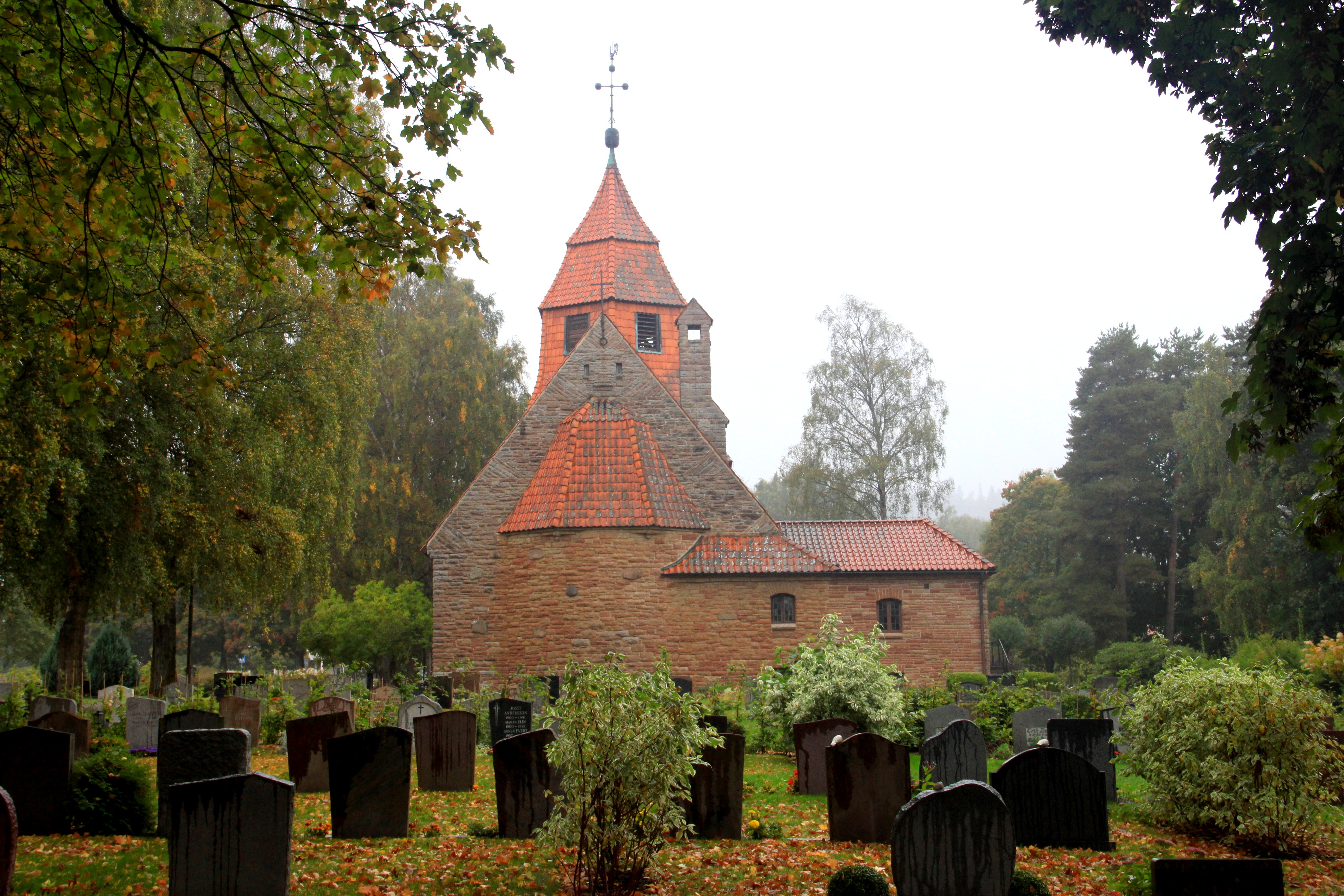 Norra Kyrketorps kyrka (Skultorp 1:33)